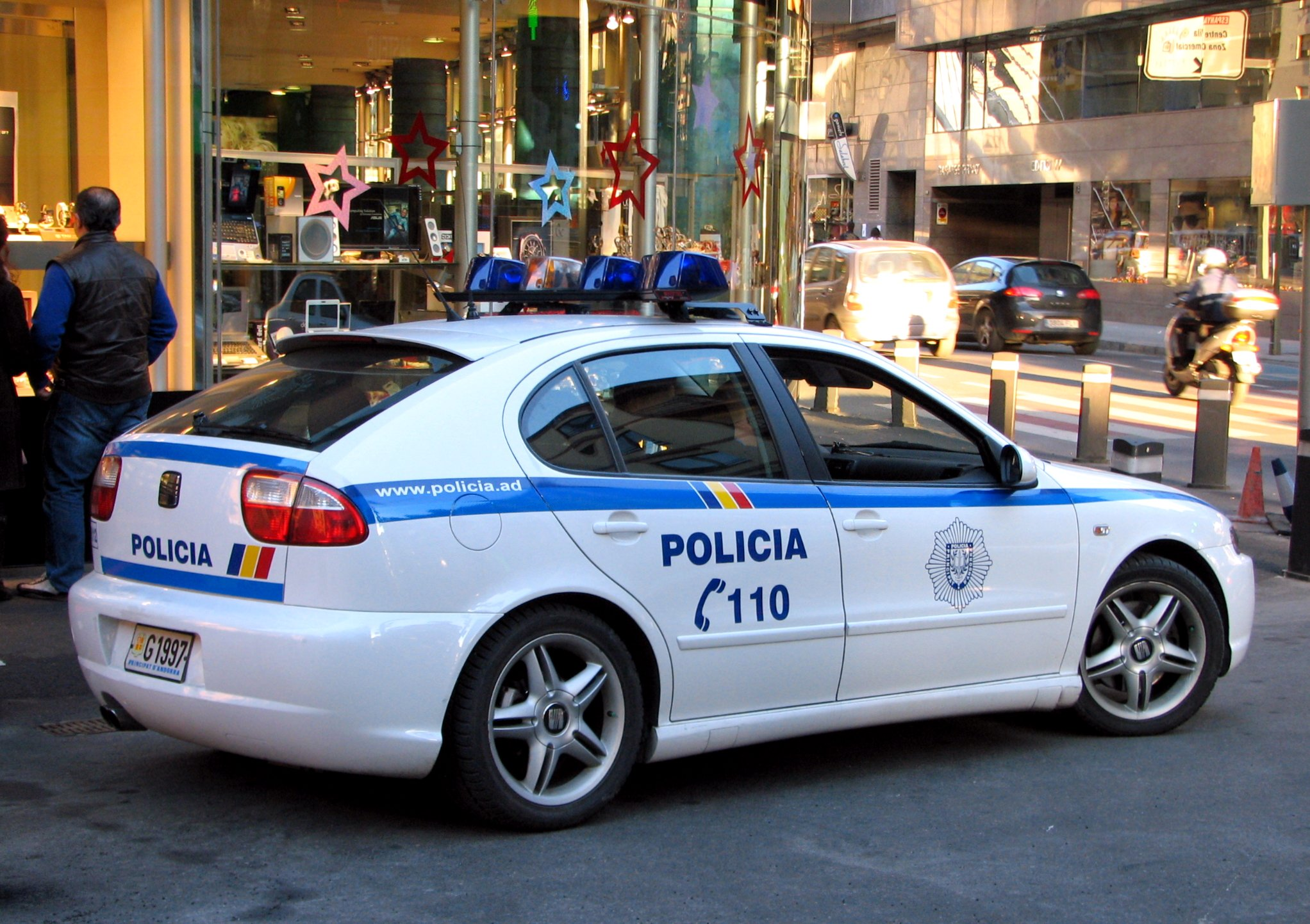 Cos de Policia Seat Leon Mk1.